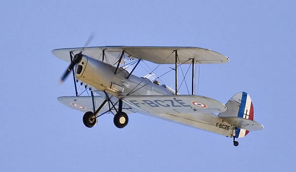 Un Stampe dans le ciel de l'île de Ré - Charente Maritime - France. Stampe SV.4 (F-BCZE)